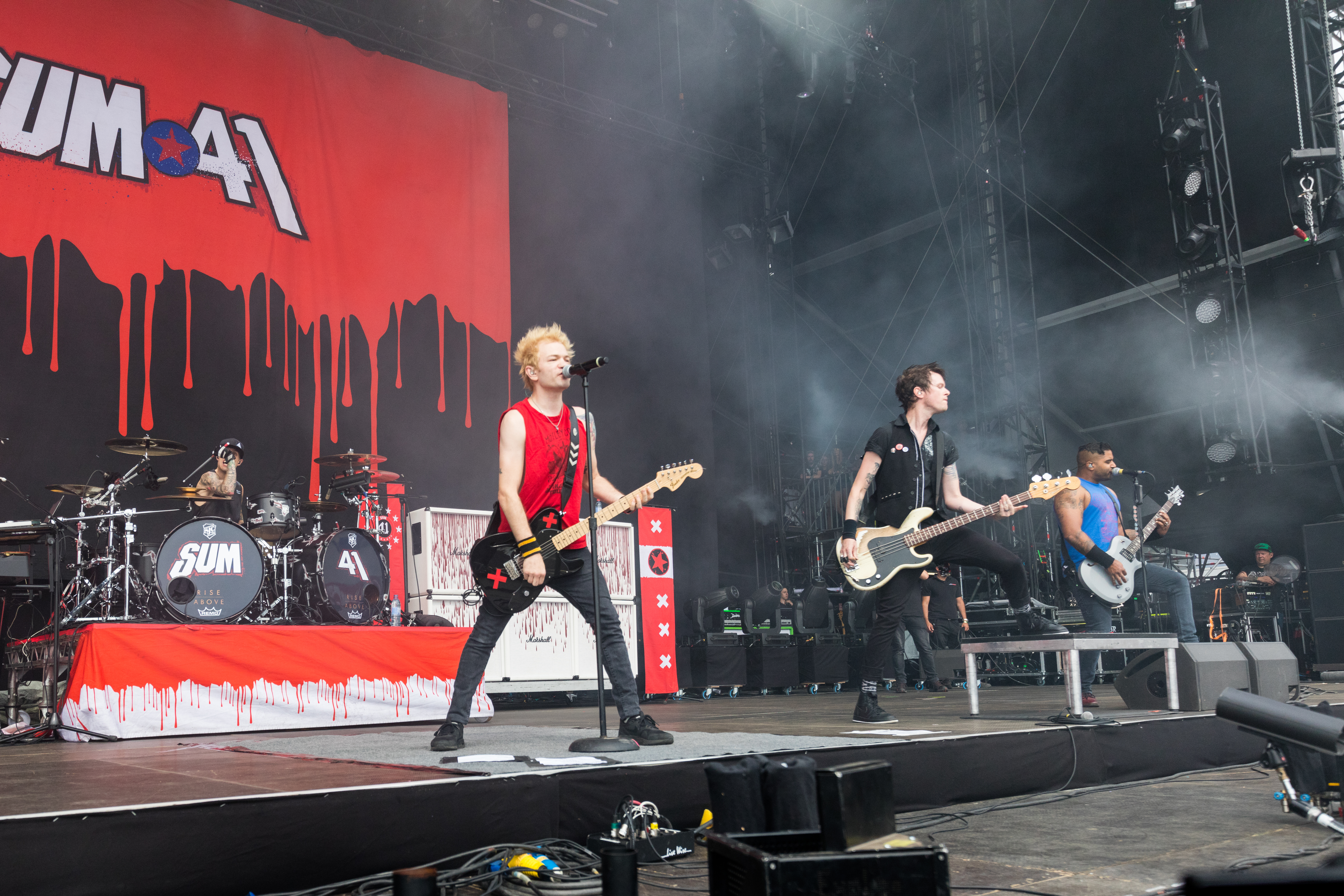 Sum 41 during Rock am Ring at Nürburgring, Nürburg, Rheinland Pfalz, Germany on 2017-06-03, Photo: Sven Mandel